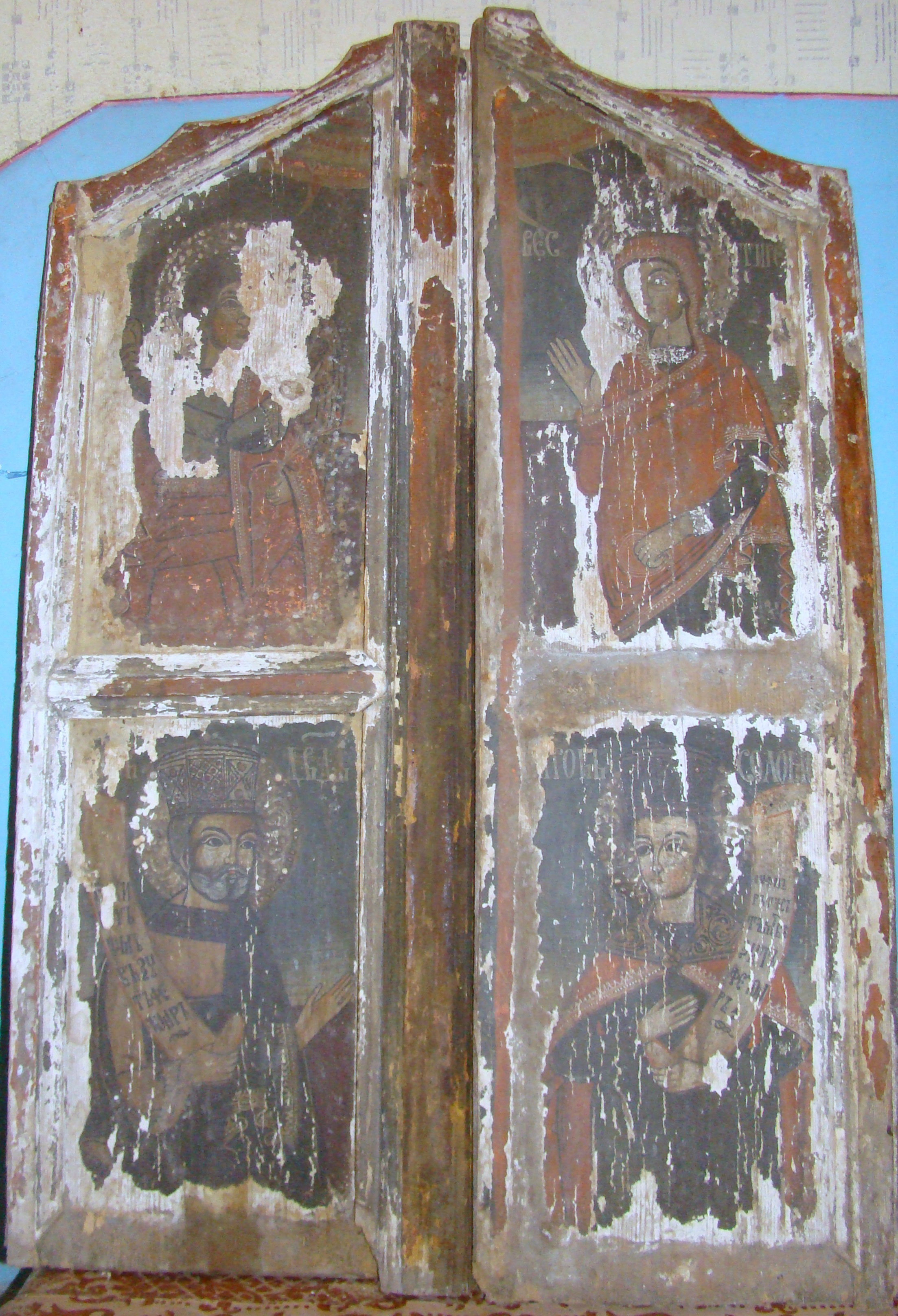 Biserica de lemn „Înălţarea Sfintei Cruci" din Pruneni